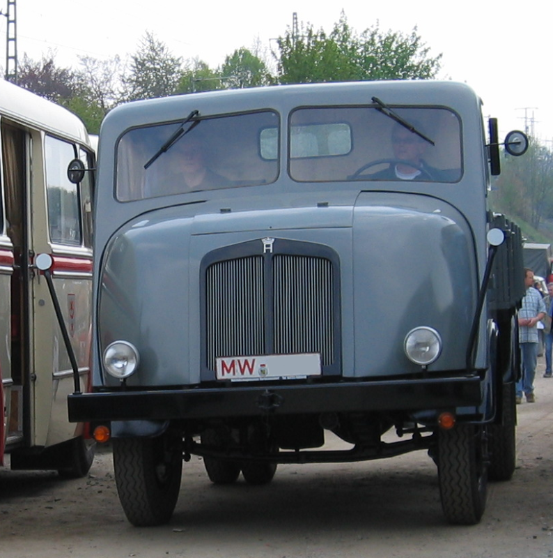 IFA H3 beim 9. IFA-Oldtimer Treffen in Werdau